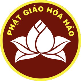 Biểu tượng Phật giáo Hòa Hảo